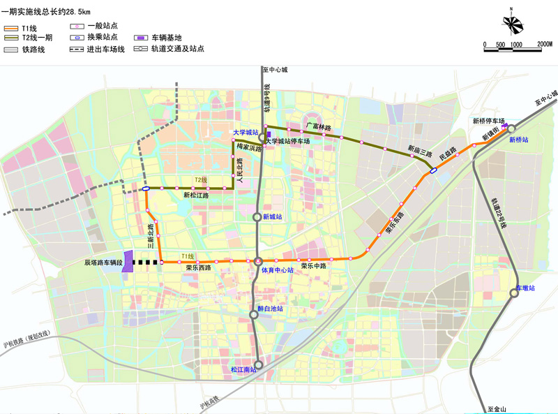 中文（中国大陆）: 松江有轨电车一期规划，资料来源于